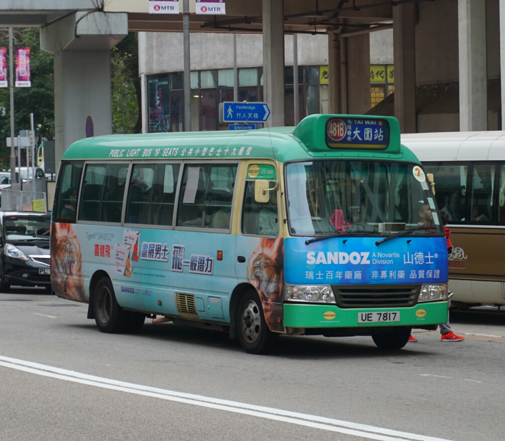 中文（香港）: 新界區專線小巴481B線，正途經西樓角路